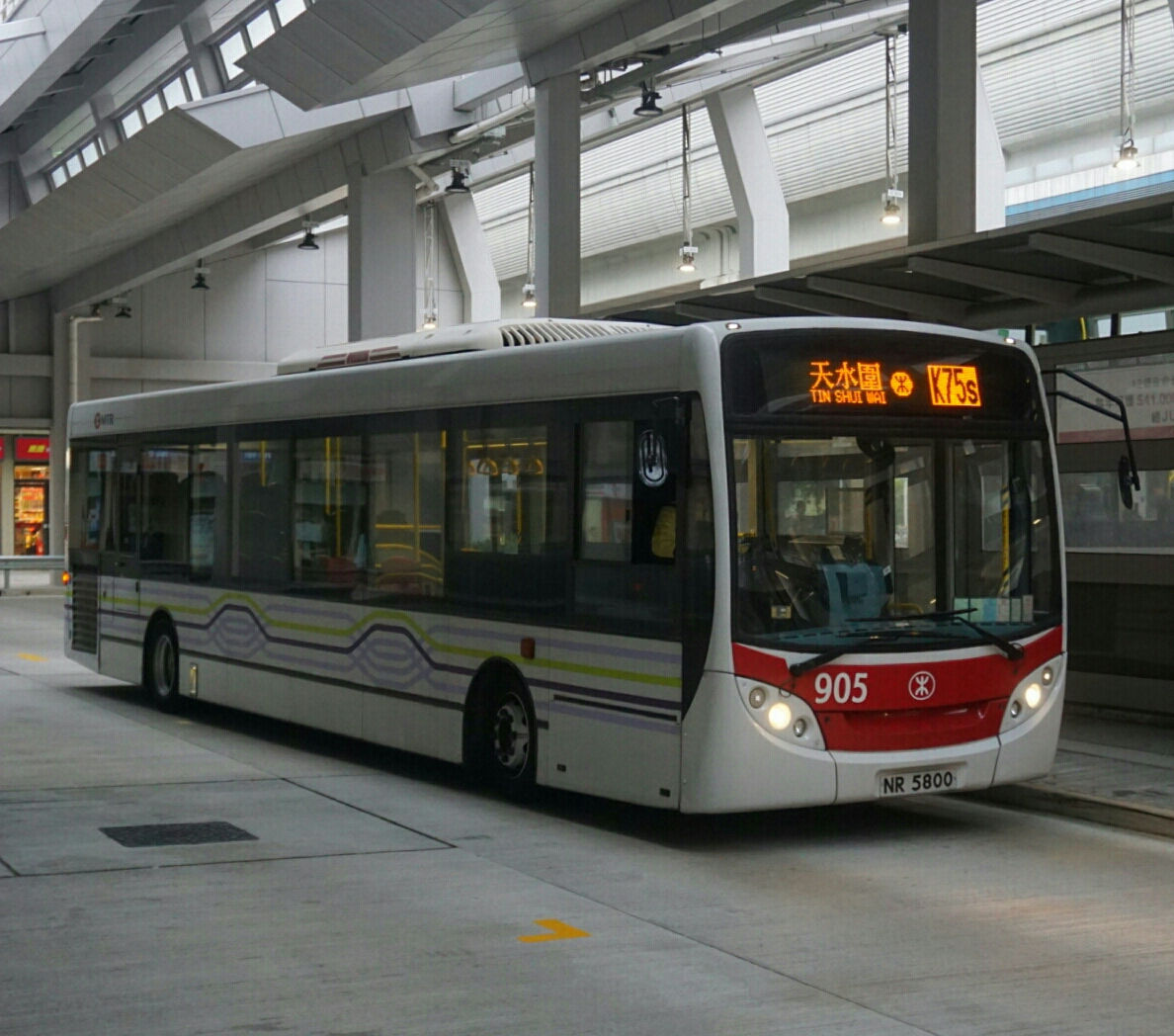 中文（香港）: 港鐵巴士K75S線，在天水圍站等待開出